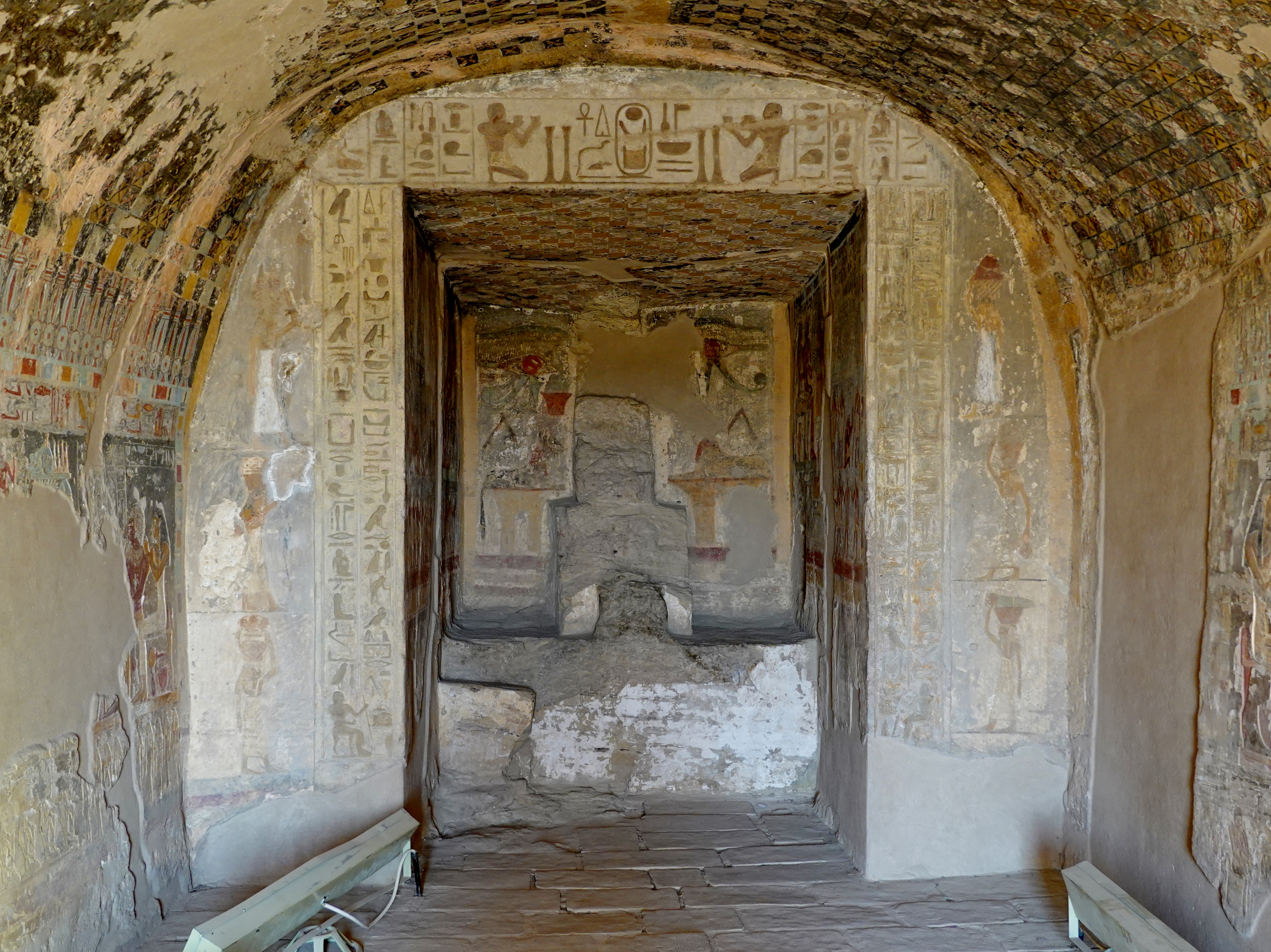 Felsengrab des Renni unter den Felsengräbern des altägyptischen Necheb bei el-Kab, Ägypten